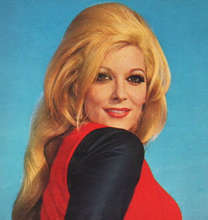 Italian actress Isabella Biagini